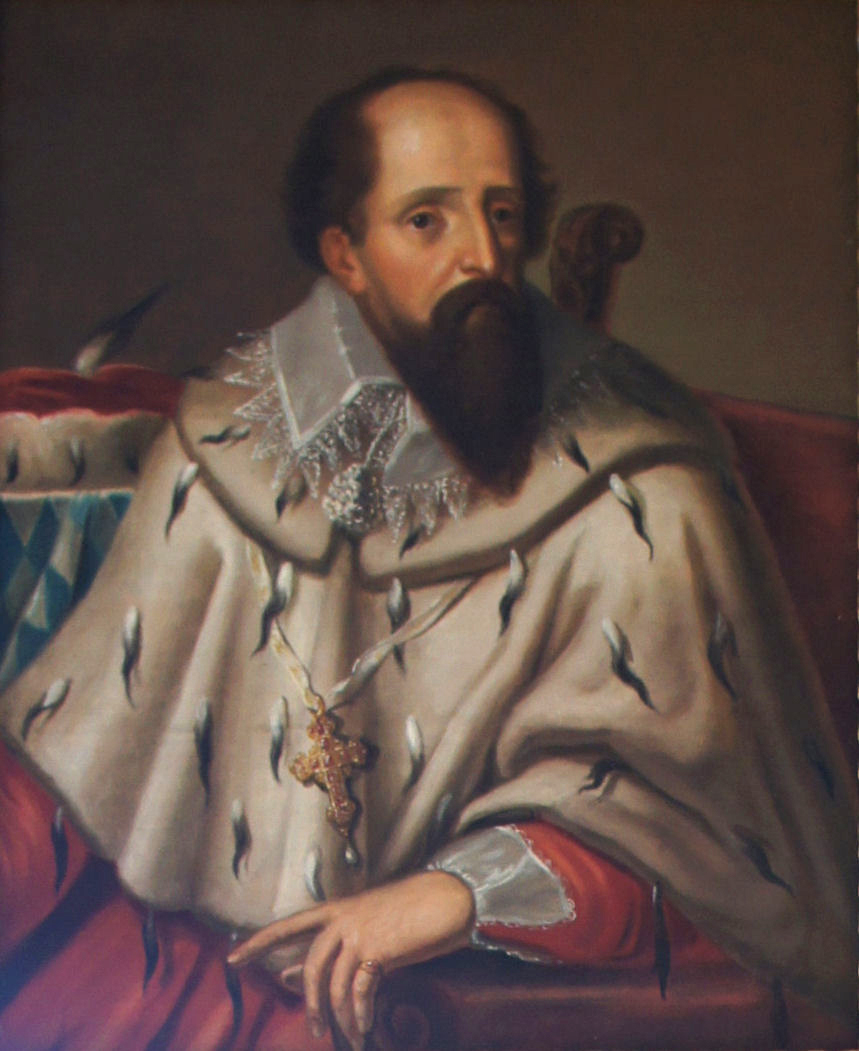 Porträtgemälde von Ernst von Bayern, Fürstbischof von Freising, im Fürstengang zwischen Fürstbischöflicher Residenz und Freisinger Dom.